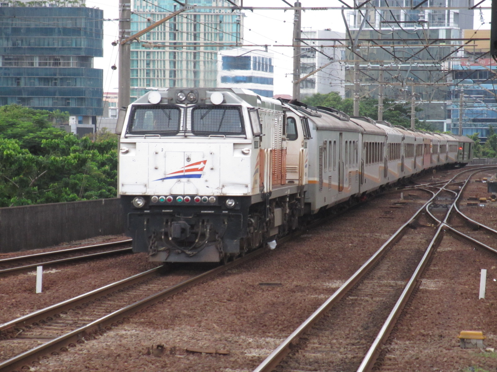 Kereta api Bima dari Surabaya tiba di Stasiun Gambir, Jakarta.